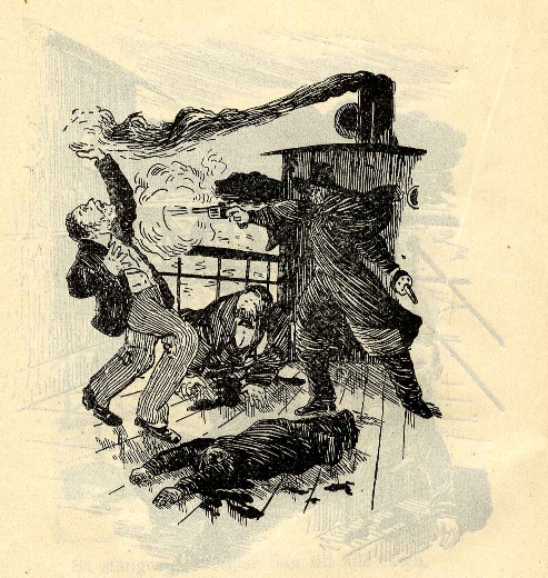 Sida ur Mälaredramat: en sångbar berättelse om de gräsliga ogerningarna å ångbåten "Prins Carl"